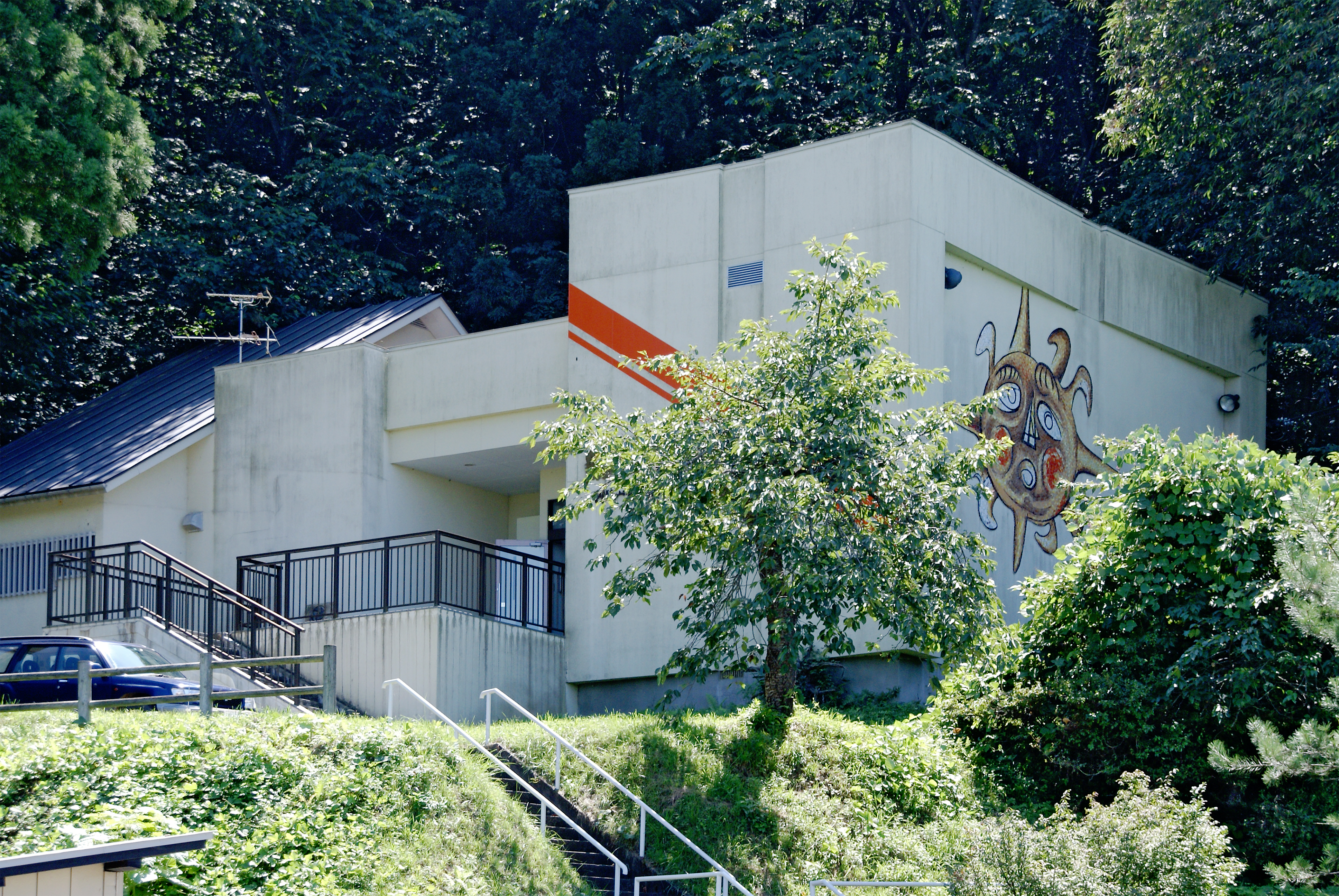 Kojin Toneyama Memorial Museum in Kitakami, Iwate prefecture, Japan